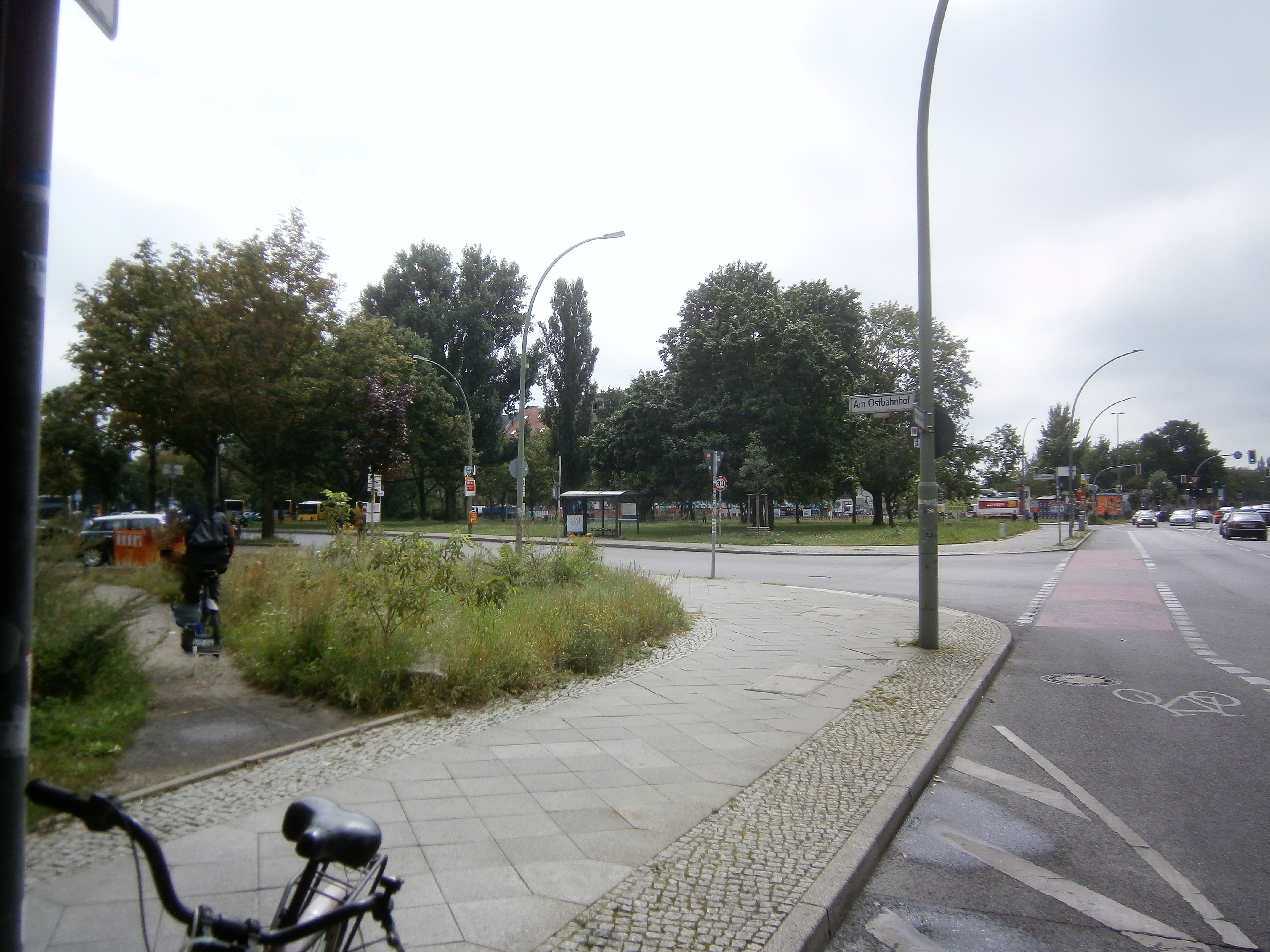 Die Andreasstraße ist eine Straße im Berliner Bezirk Friedrichshain-Kreuzberg, Ortsteil Friedrichshain. Angelegt wurde sie 1862 auf vorherigen Gartenland und 1863 benannt. Bis um 1900 waren die Grundstücke bebaut und bis 1930 wurde verdichtet. Bei Luftangriffen im Zweiten Weltkrieg wurde die Gebäude schwer getroffen. So ist die Straße seit den 1950er Jahren mit wiederhergestellten Altbauten, aber besondres durch Plattenbau-Wohnblöcke aber seit 1990 auch durch Hotel- und Bürobauten im Umfeld des Ostbahnhofs charakterieisiert. Das Bild zeigt die durh die Kriegszerstörungen verbliebenen Freiflächen von Andreasstraße 5 (vor Ecke Am Ostbahnhof) sowie des Schulgebäudes 1/2 und der Wohnhäuser 3 und 4.